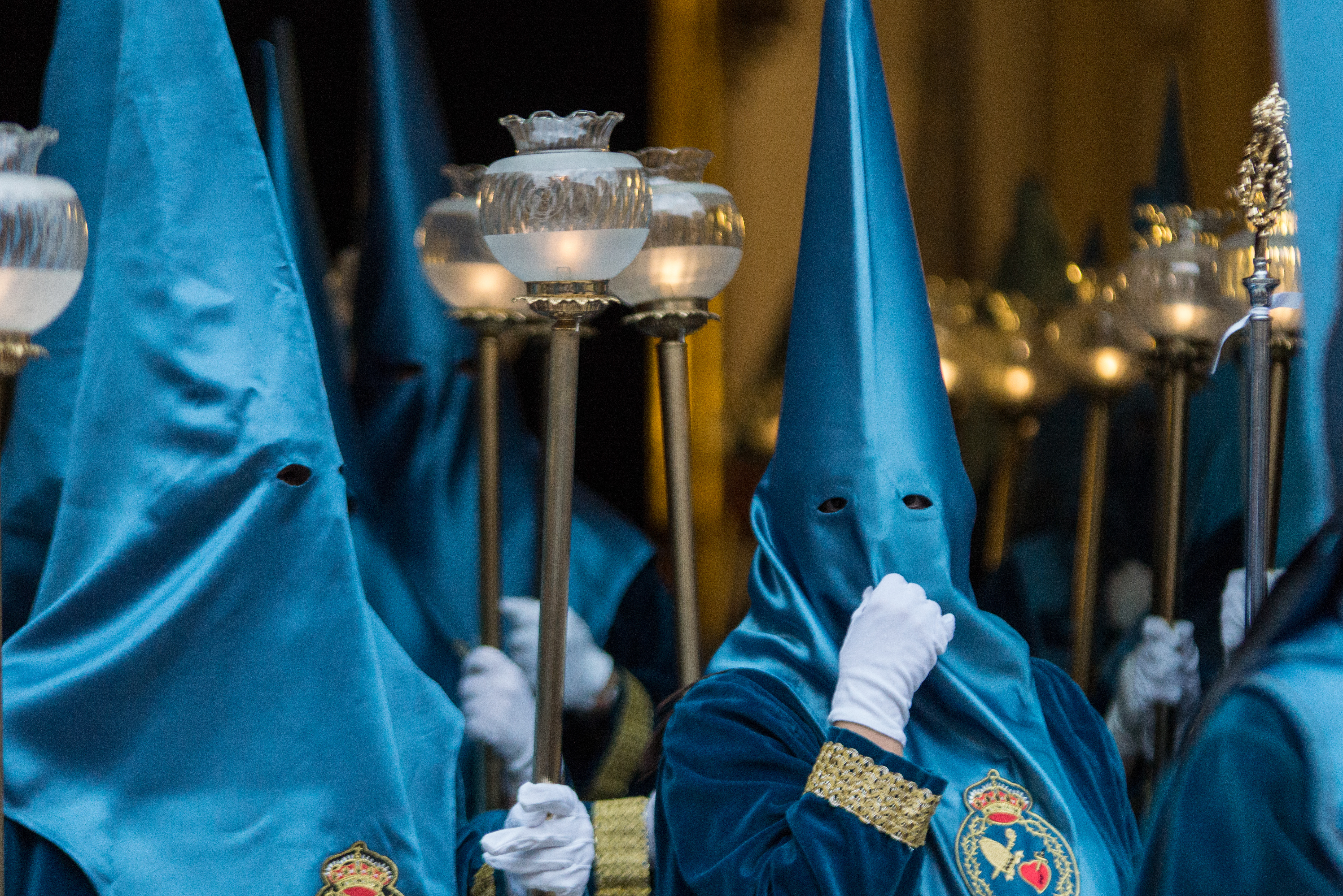 Cofradia del Amparo Murcia - Cofrades This is a photography of a Folklore festival in Spain (Wikidata id Q5685566).